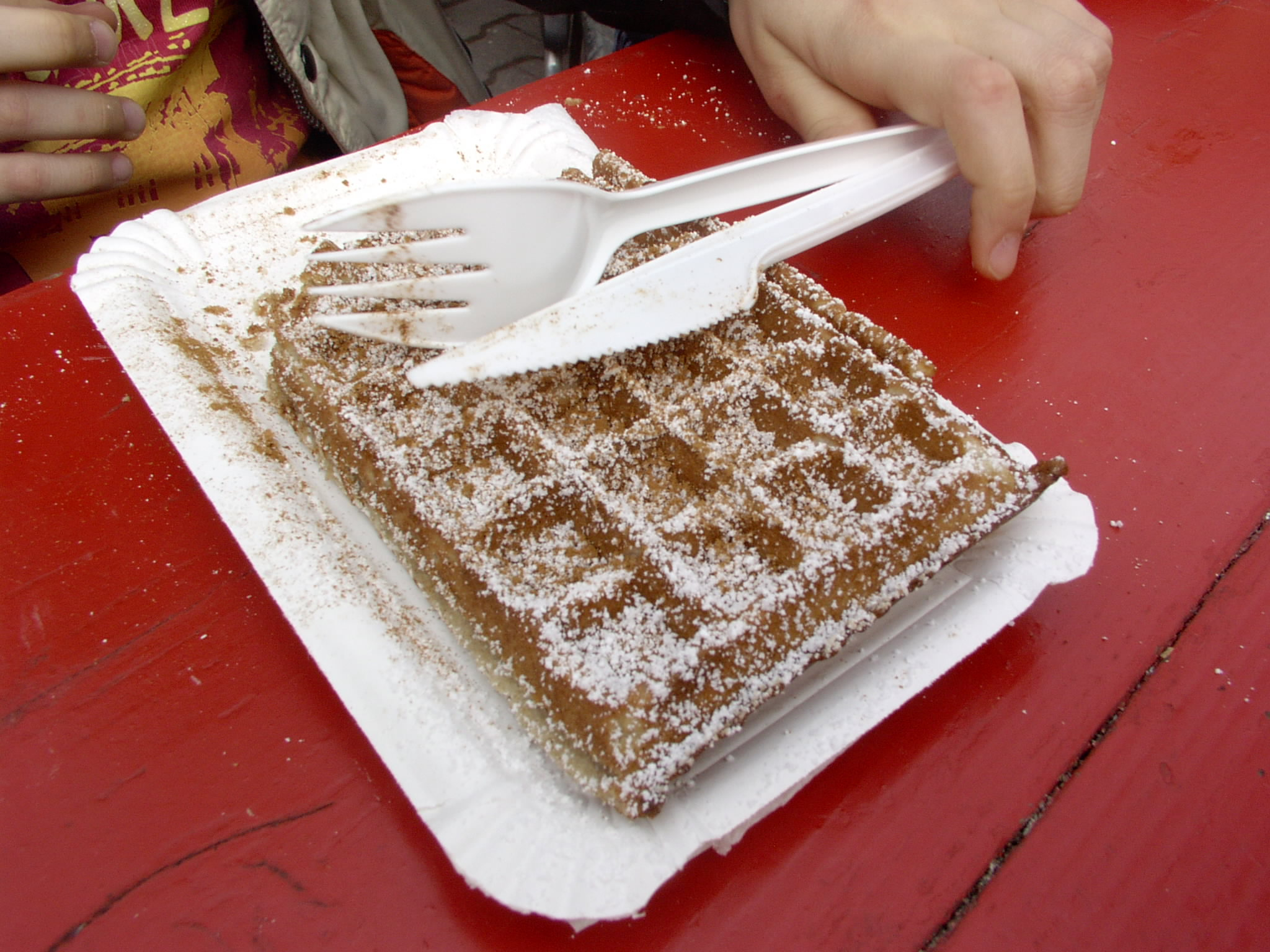 Waffel mit Plastikbesteck